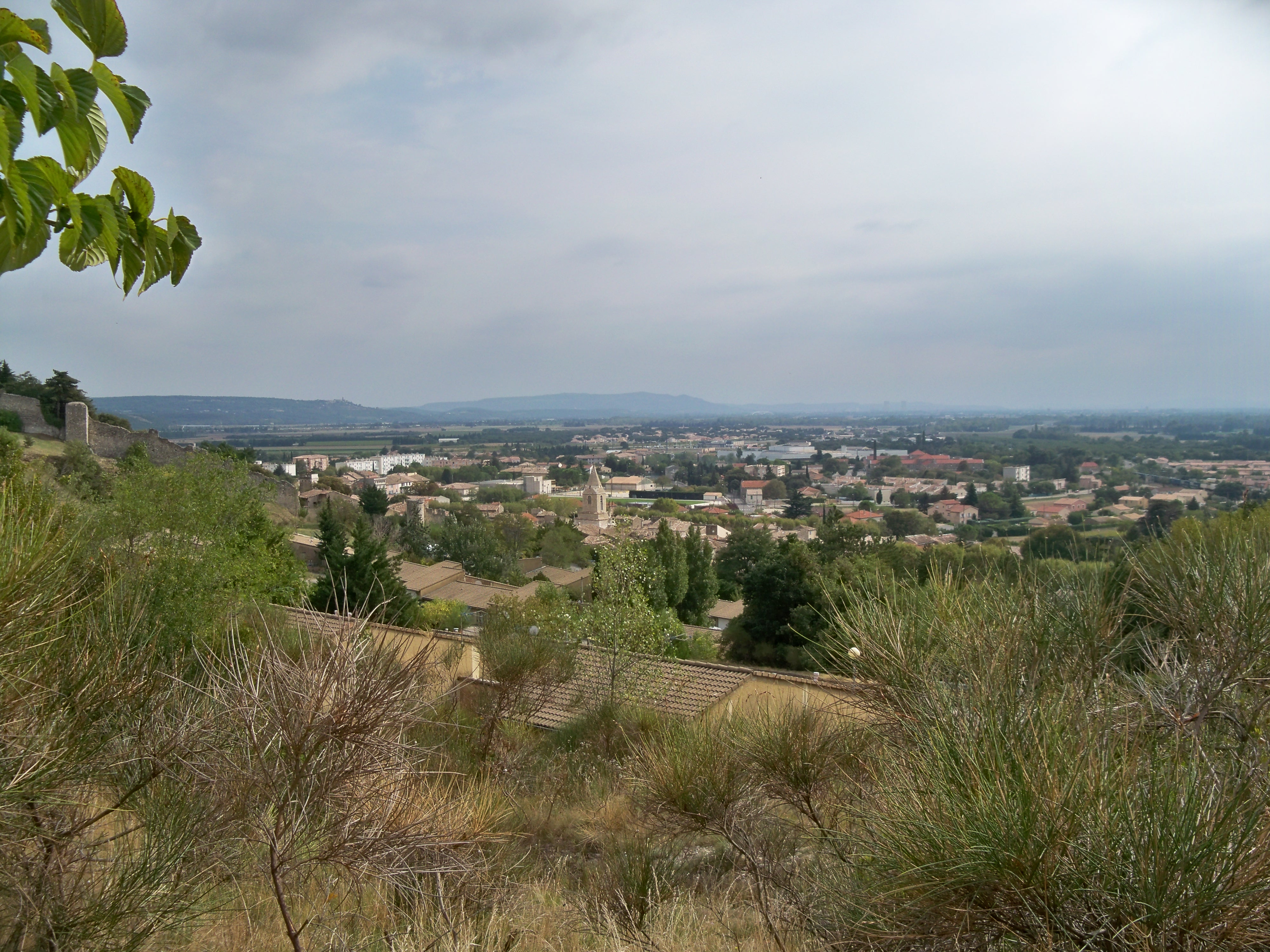 vue sur Donzère